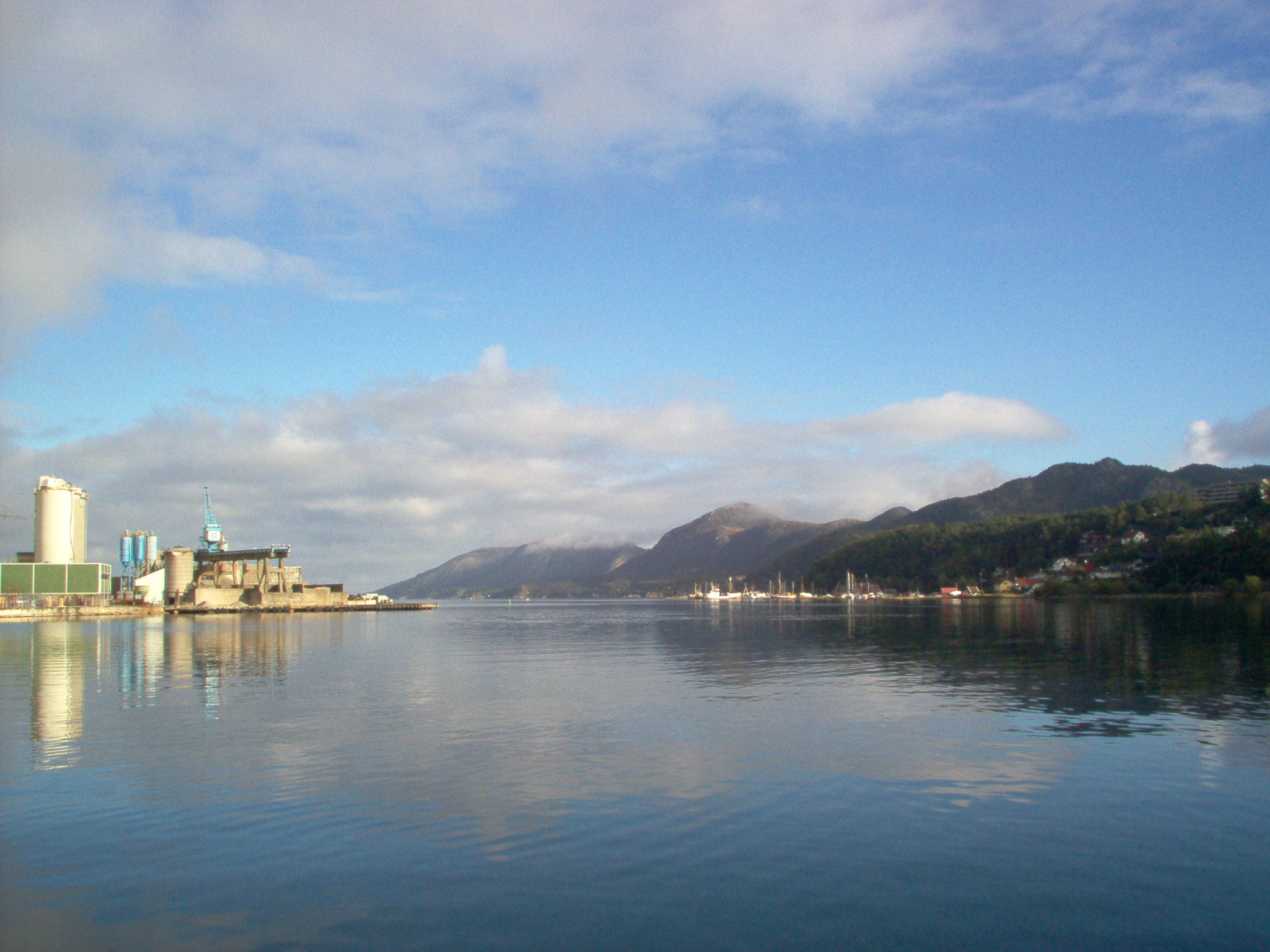 Gandsfjorden seen from Sandnes.